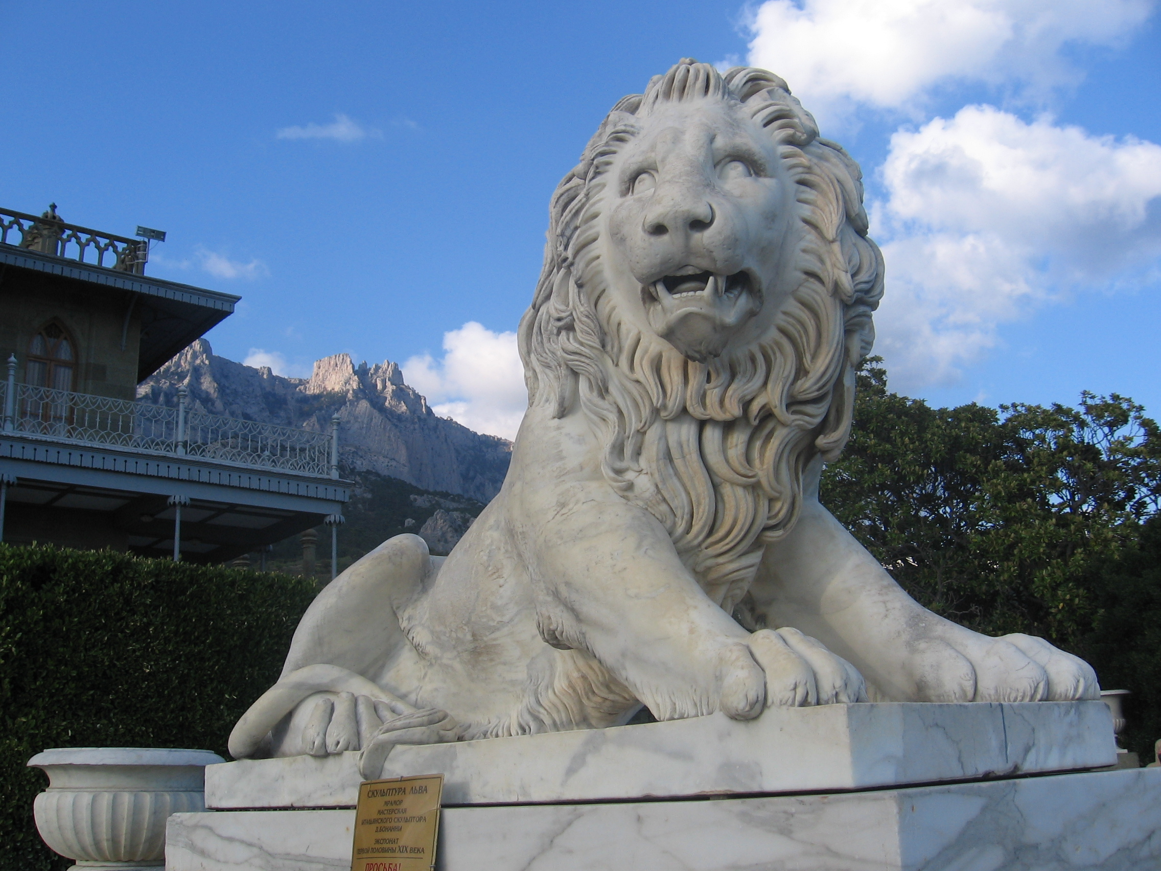 Фото